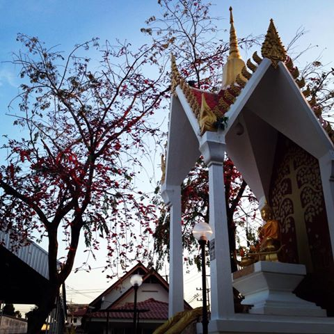 พระพุทธรัตนมงคลภิมุข